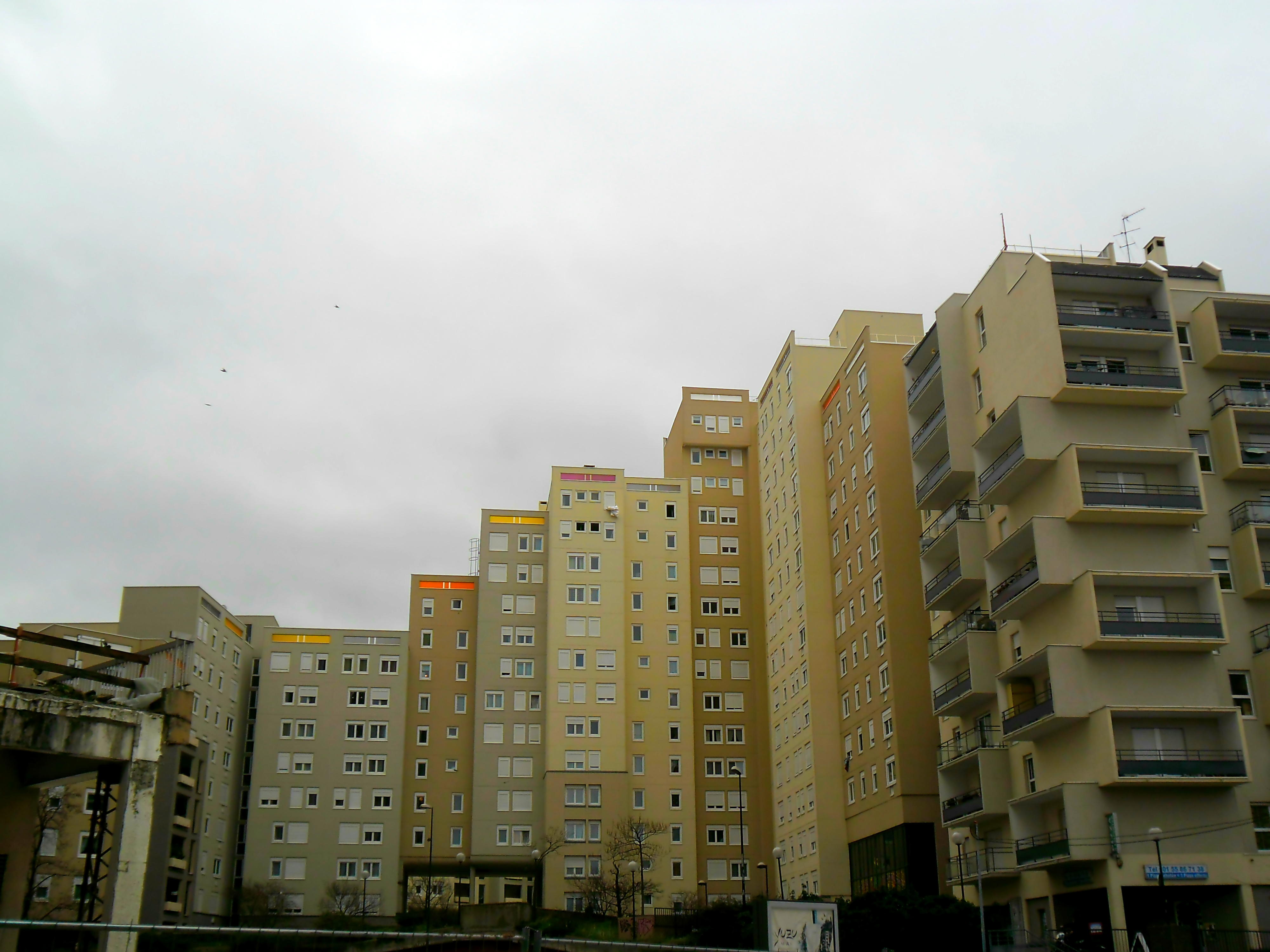 Montreuil 93